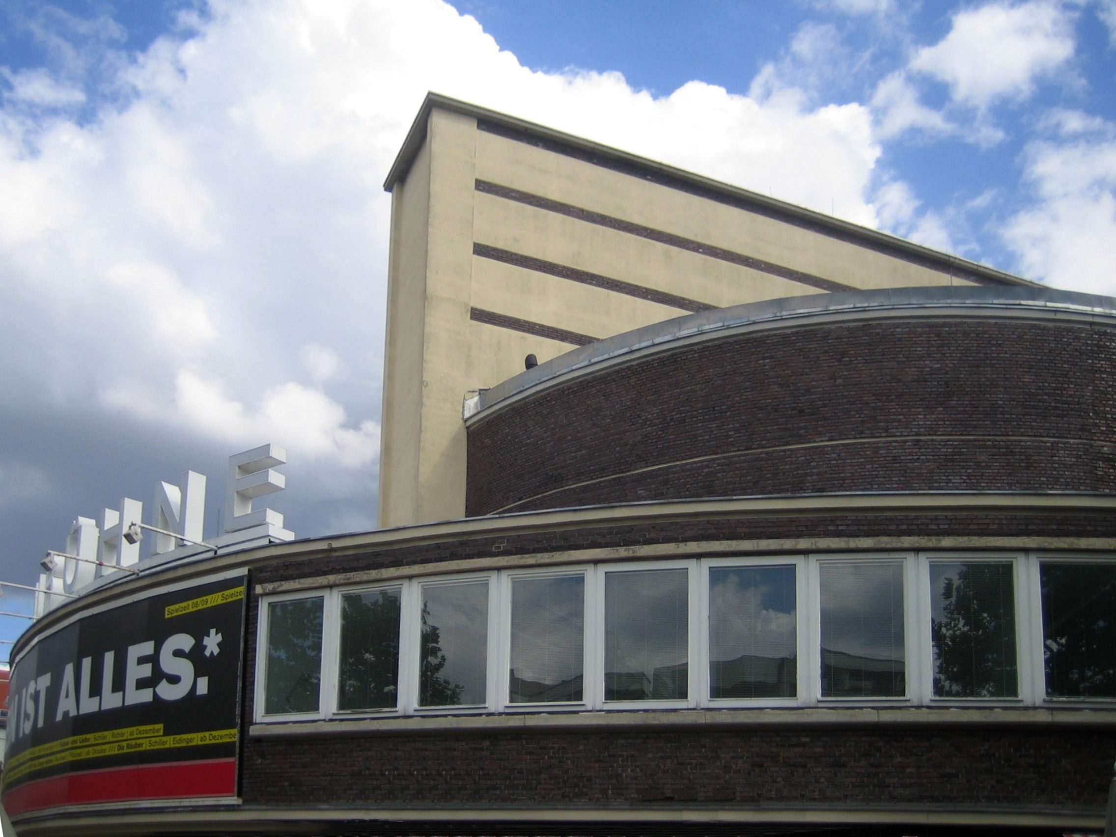 Berlin, Schaubühne am Lehniner Platz, erbaut 1928 von Erich Mendelsohn. Teilansicht.